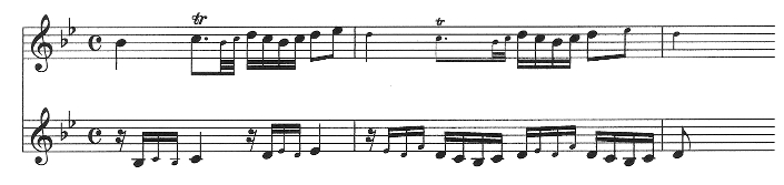 Johannes Brahms op. 24: Entwickung des Fugenthemas aus der Aria